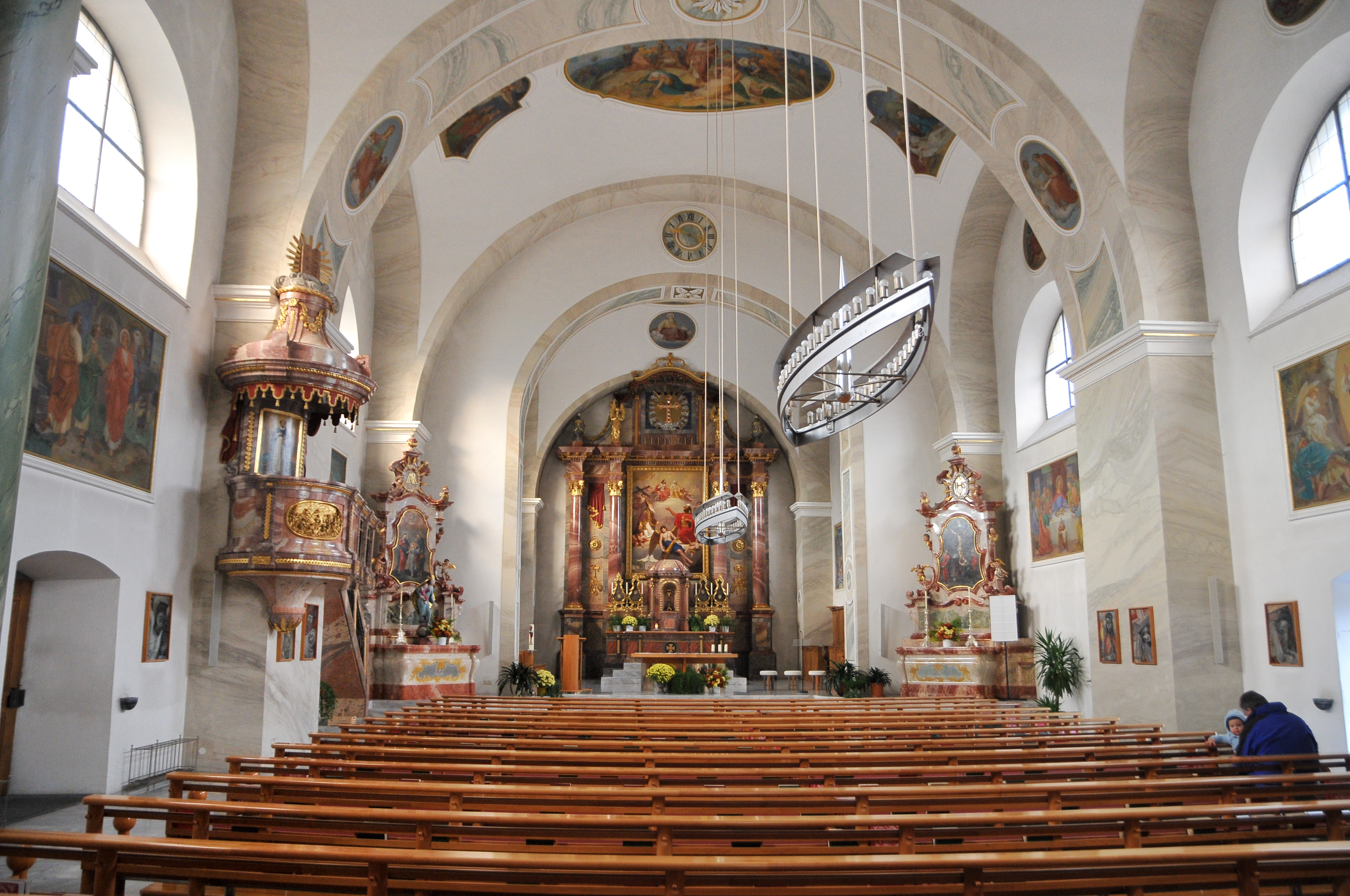 In der Pfarrkirche "hl. Georg" in Satteins in Vorarlberg. Die Decken-Fresken im Langhaus, im 1. Joch vor dem Chor, mittig Moses und die Eherne Schlange, links Kreuzigung Christi und rechts Grablegung, an den Gurtbögen in Ovalmedaillons die vier Evangelisten und die vier Kirchenväter, malten 1884/1885 die Maler Johann Kärle und Emanuel Walch.